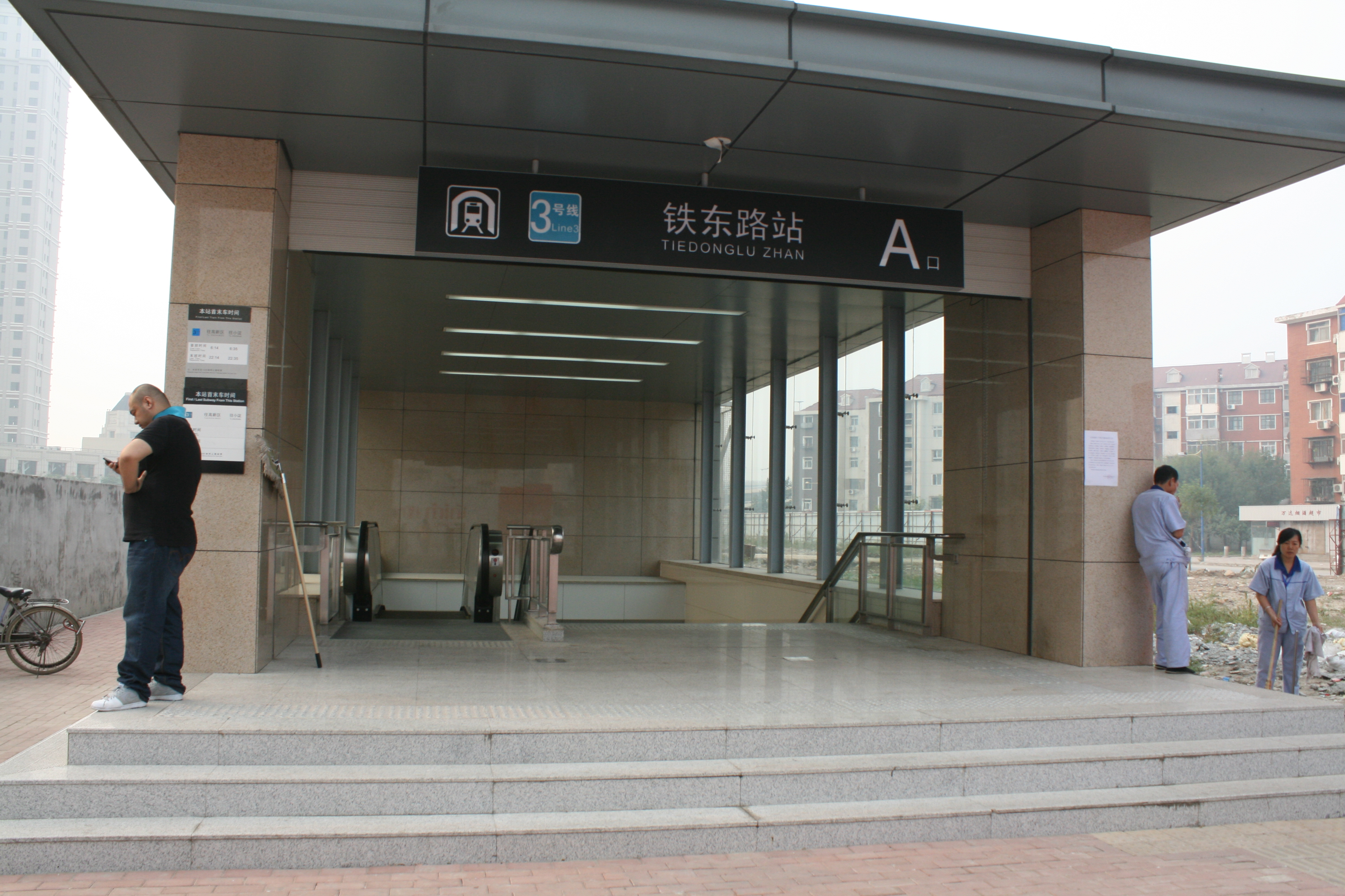 天津地鐵三號線鐵東路站A口